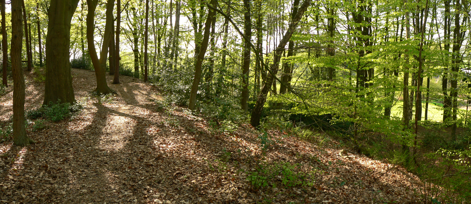 Dersaburg, Blick vom Ringwall (links) zur Niederung (rechts)